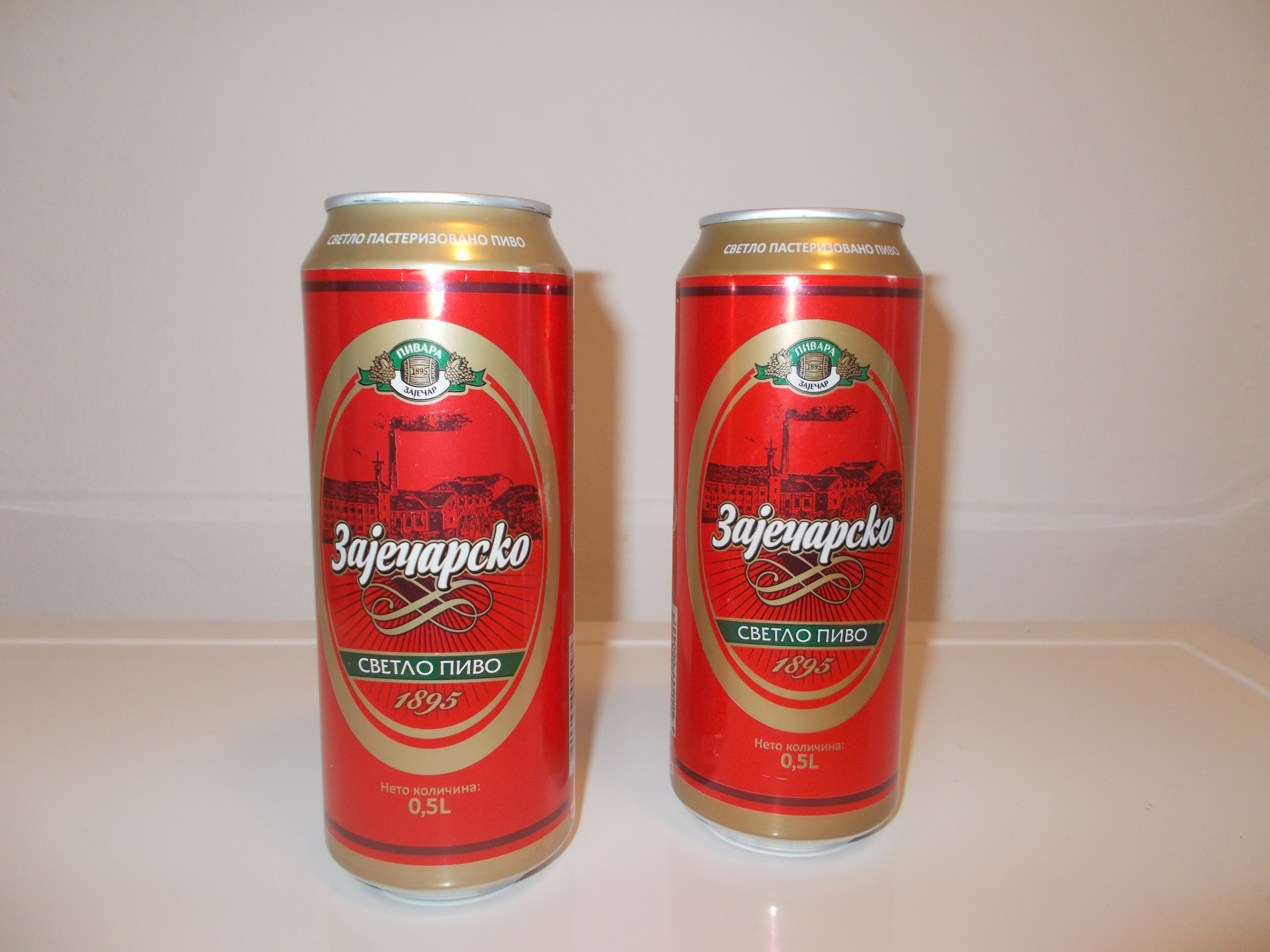 моје дело